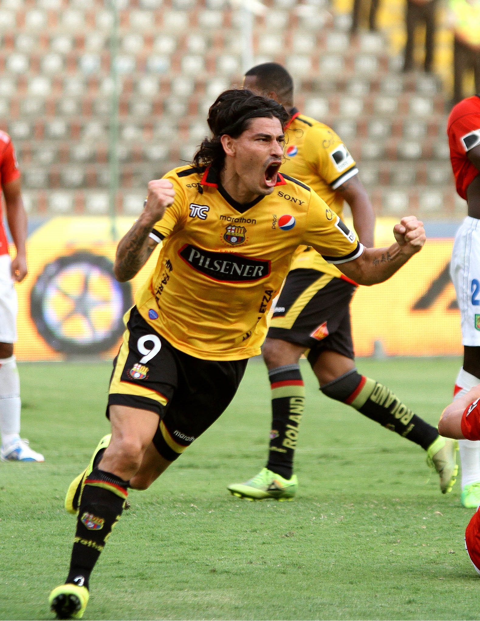 Guayaquil, 15 denoviembre del 2014 Ismael Blanco celebra el gol del empate ante el Deportivo Cuenca en el partido jugado en el estadio Monumental por la décima sexta fecha del campeonato nacional de fútbol César Muñoz/Andes